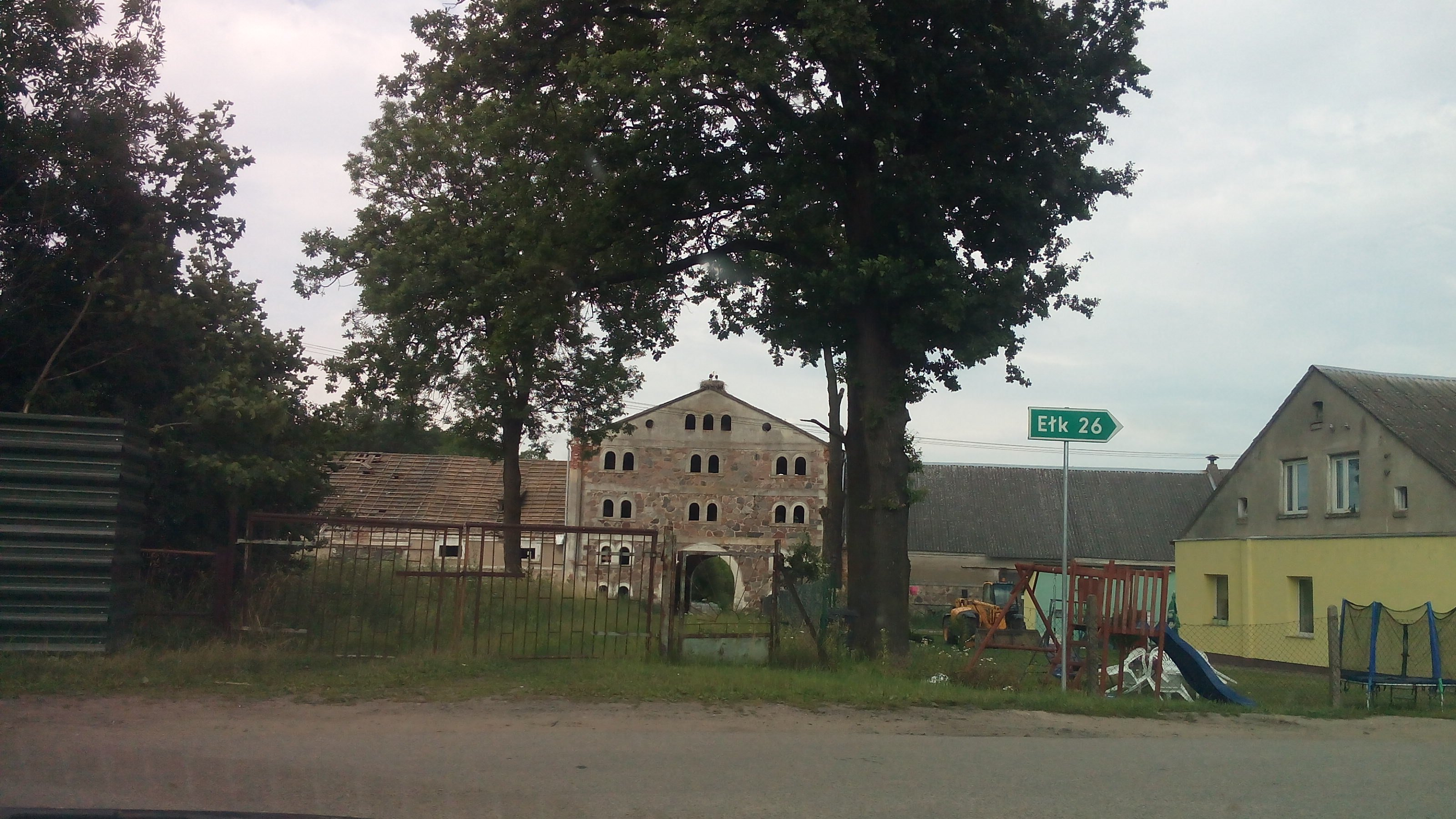 Gniazdo bociana białego znajdujące się we wsi Ranty